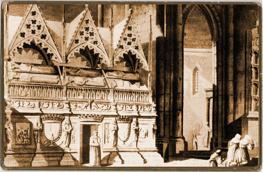 Postal de 1920 reproduciendo los sepulcros del monasterio de poblet, ( un grabado de Alexander Laborde de 1806 )